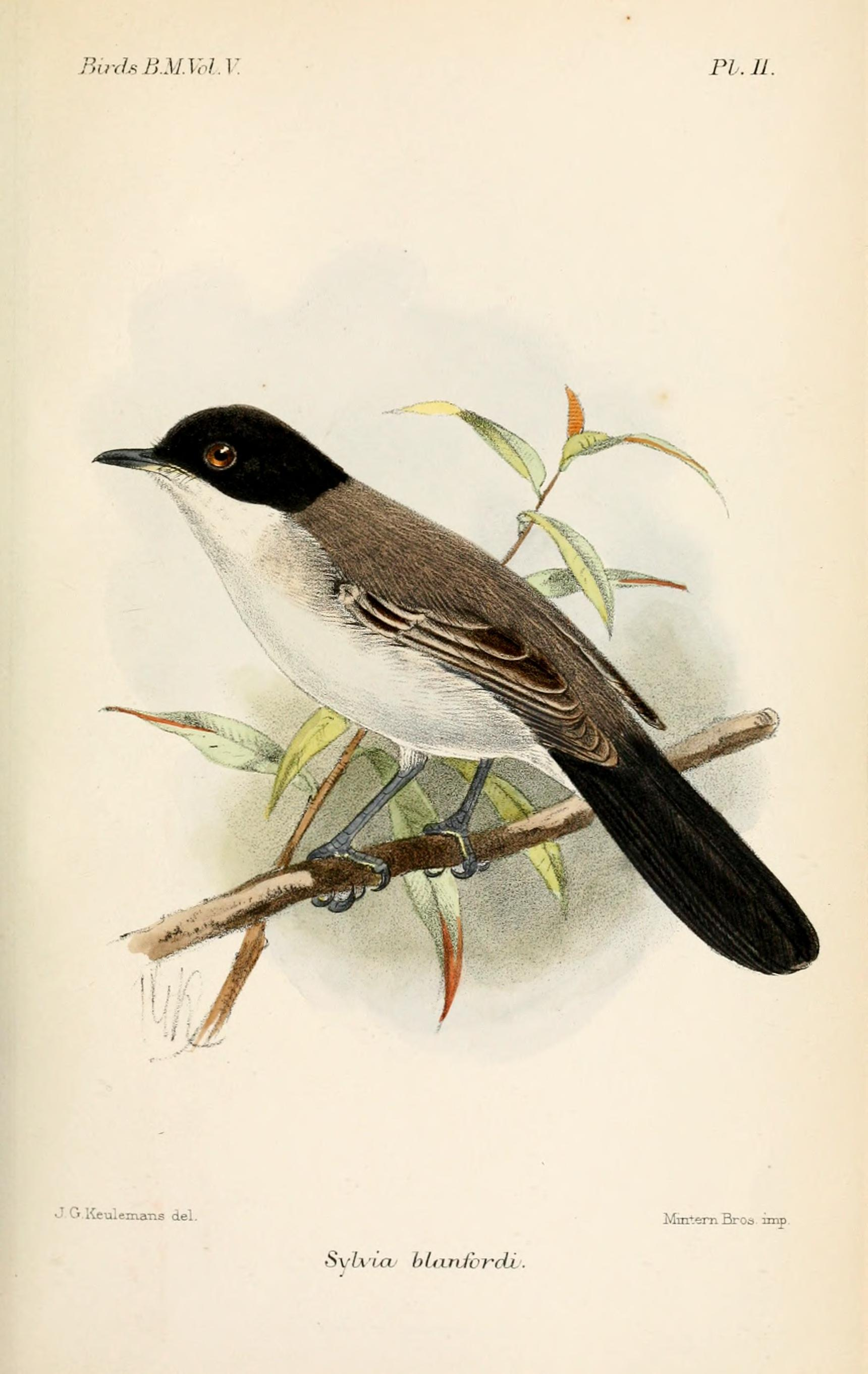 Sylvia blanfordi = Sylvia leucomelaena, Red Sea Warbler